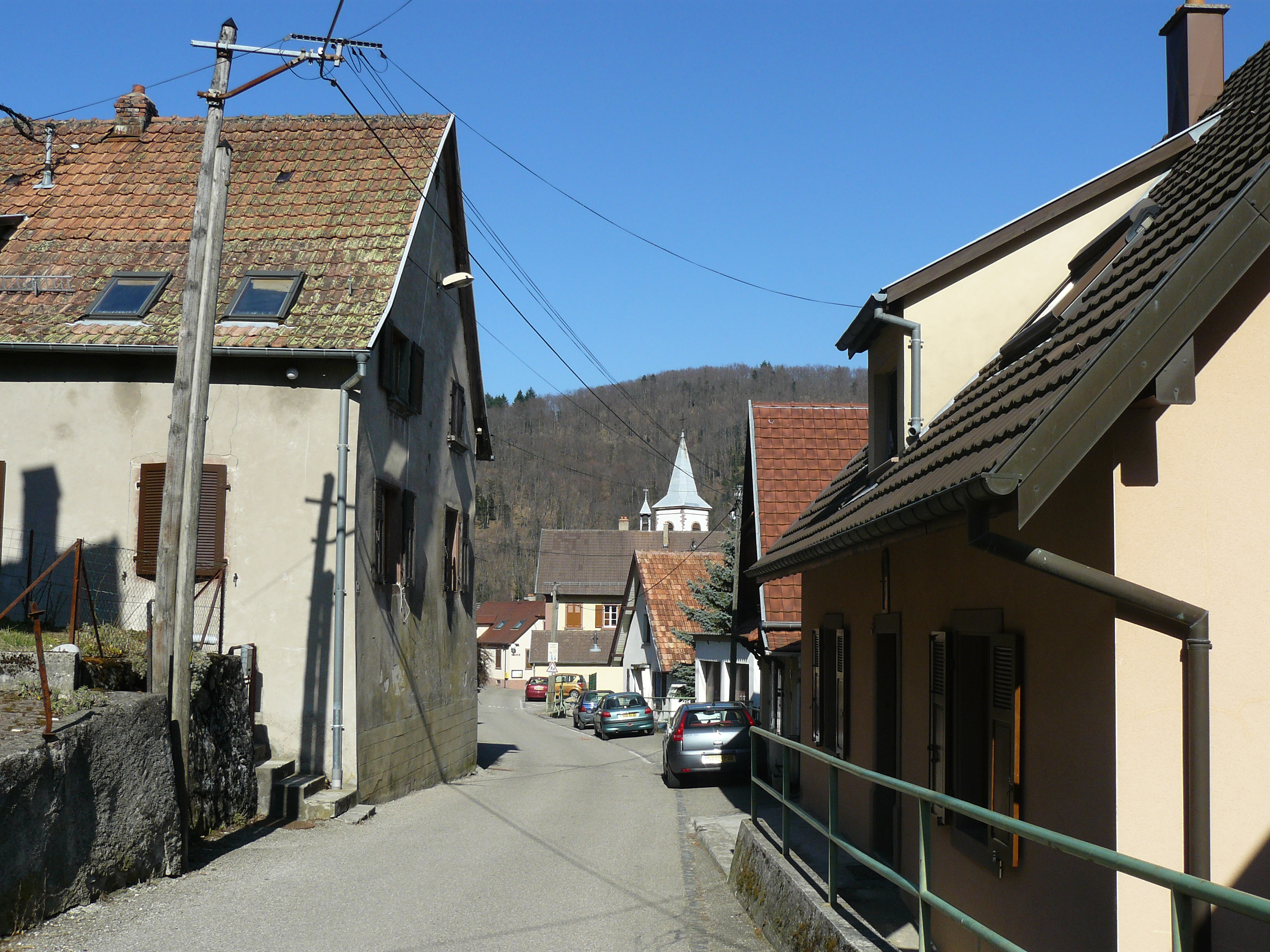 Le centre du village de Rimbach-Zell